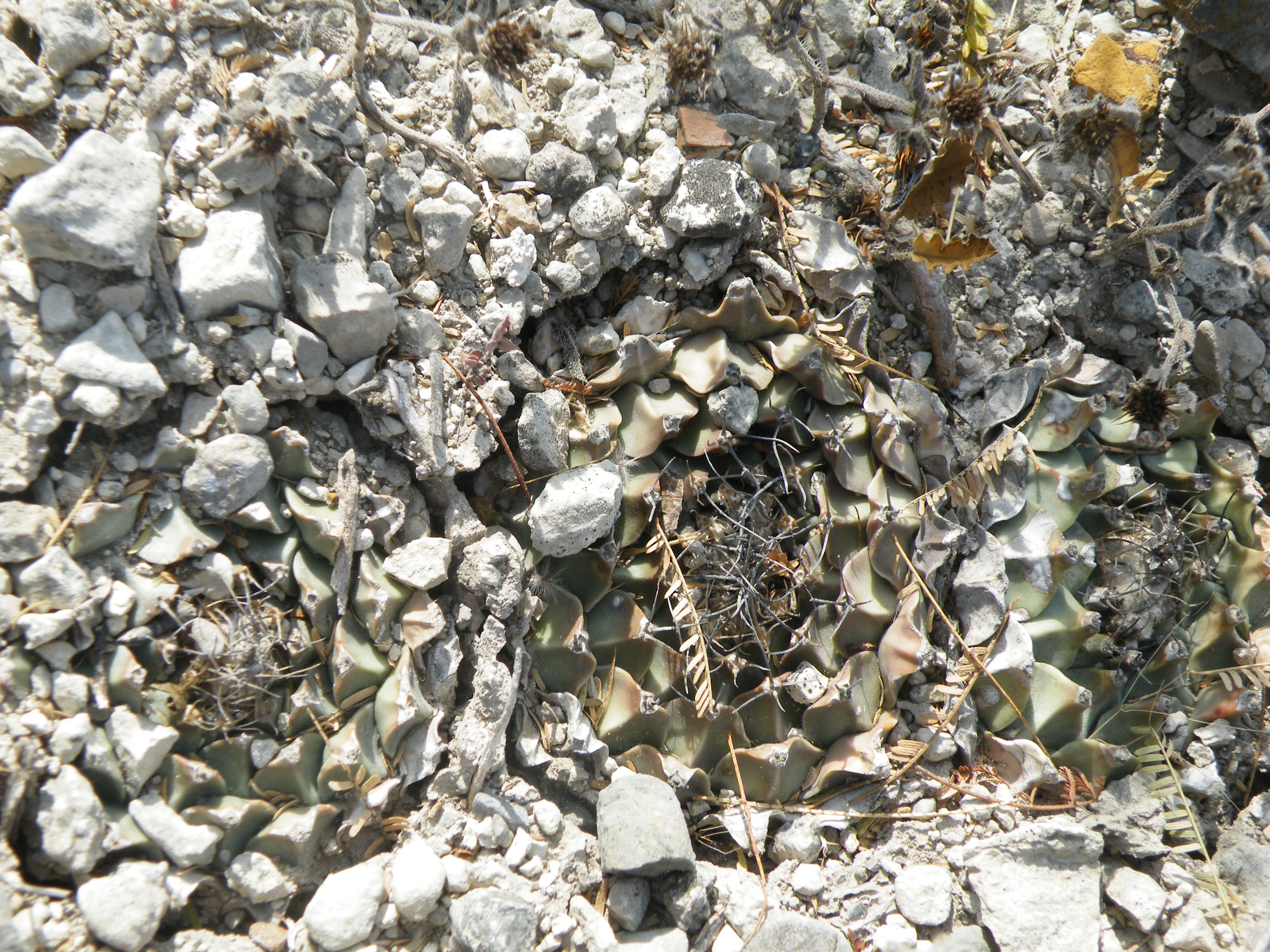 San Jose De Salamanca, Tamaulipas